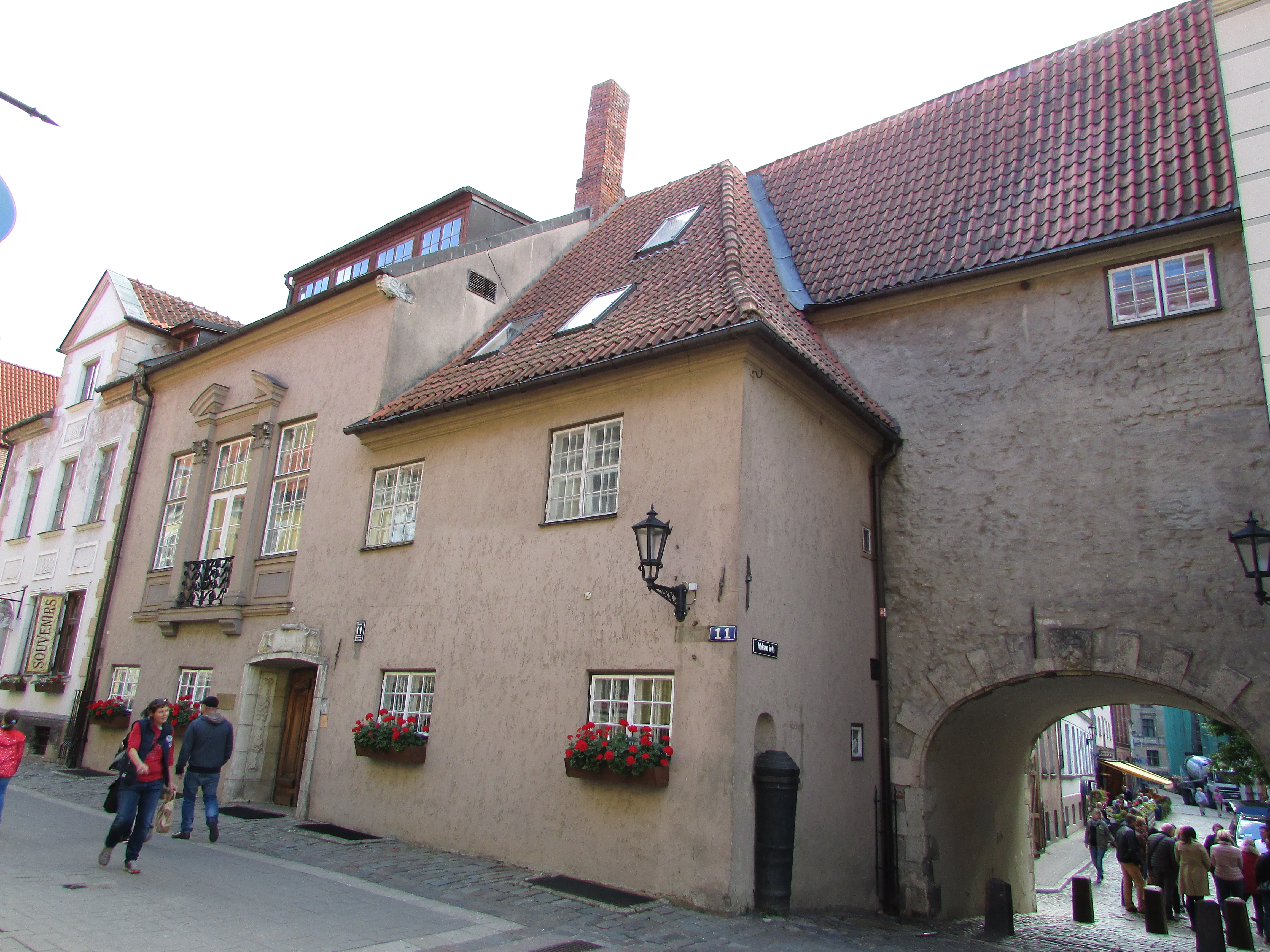 Dzīvojamo ēku komplekss, t.sk. Zviedru vārti, Rīga, Torņa iela 3; Torņa iela 9; Torņa iela 11; Torņa iela 19; Torņa iela 5